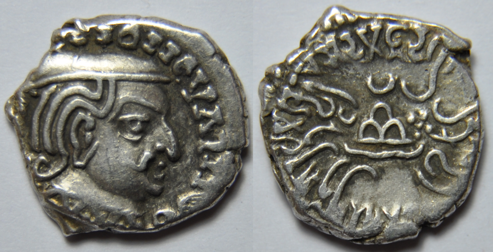 Une drachme en argent du roi Vijayasena (239-250 AD) des Satrapes occidentaux (Ier-IVe siècles). Dimensions : 15 mm Poids : 2,1 g. Référence : MACW 2702/03 Coins of rulers of India